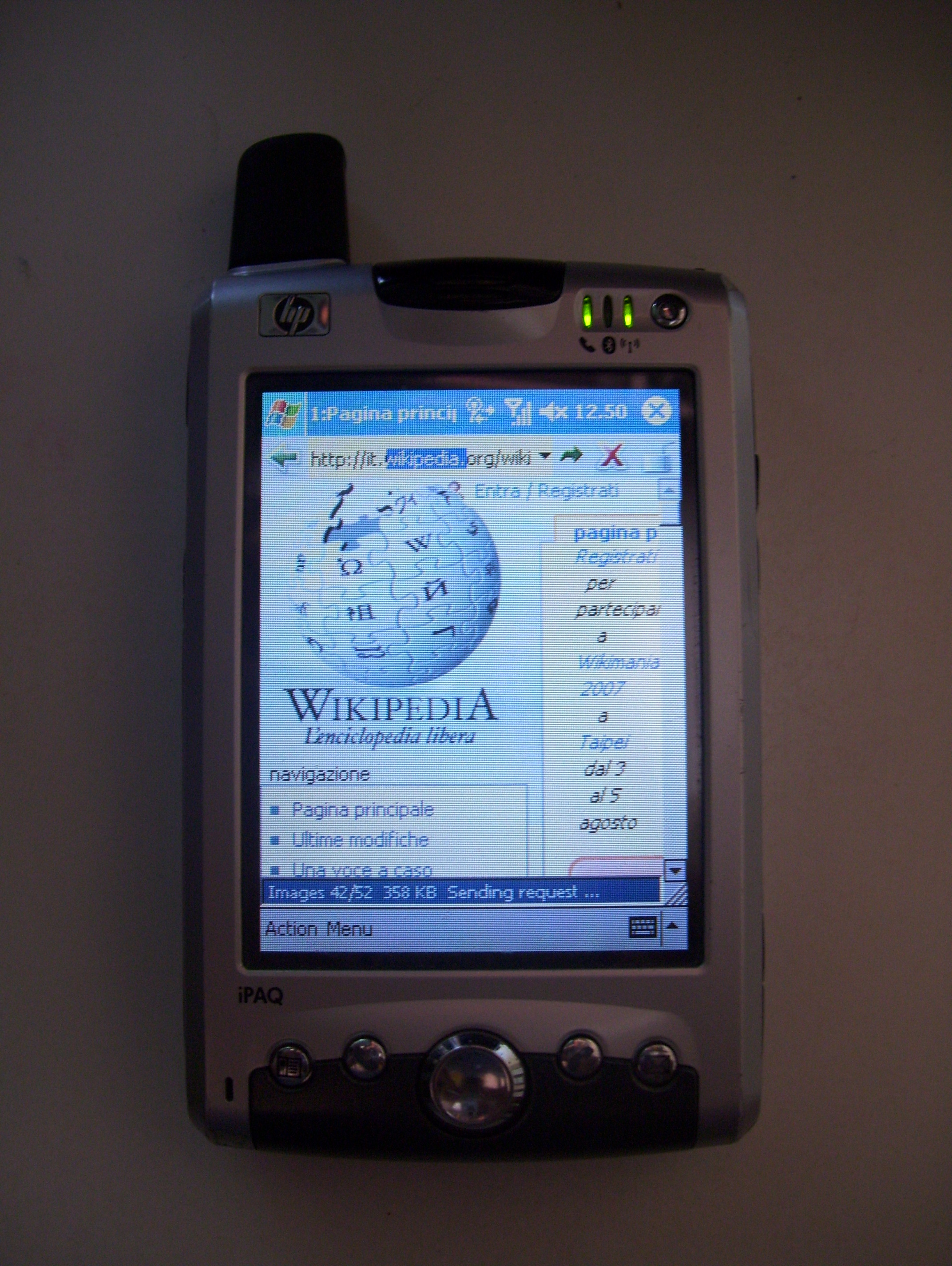 Un PocketPC HP h6340 mentre visualizza la home page di